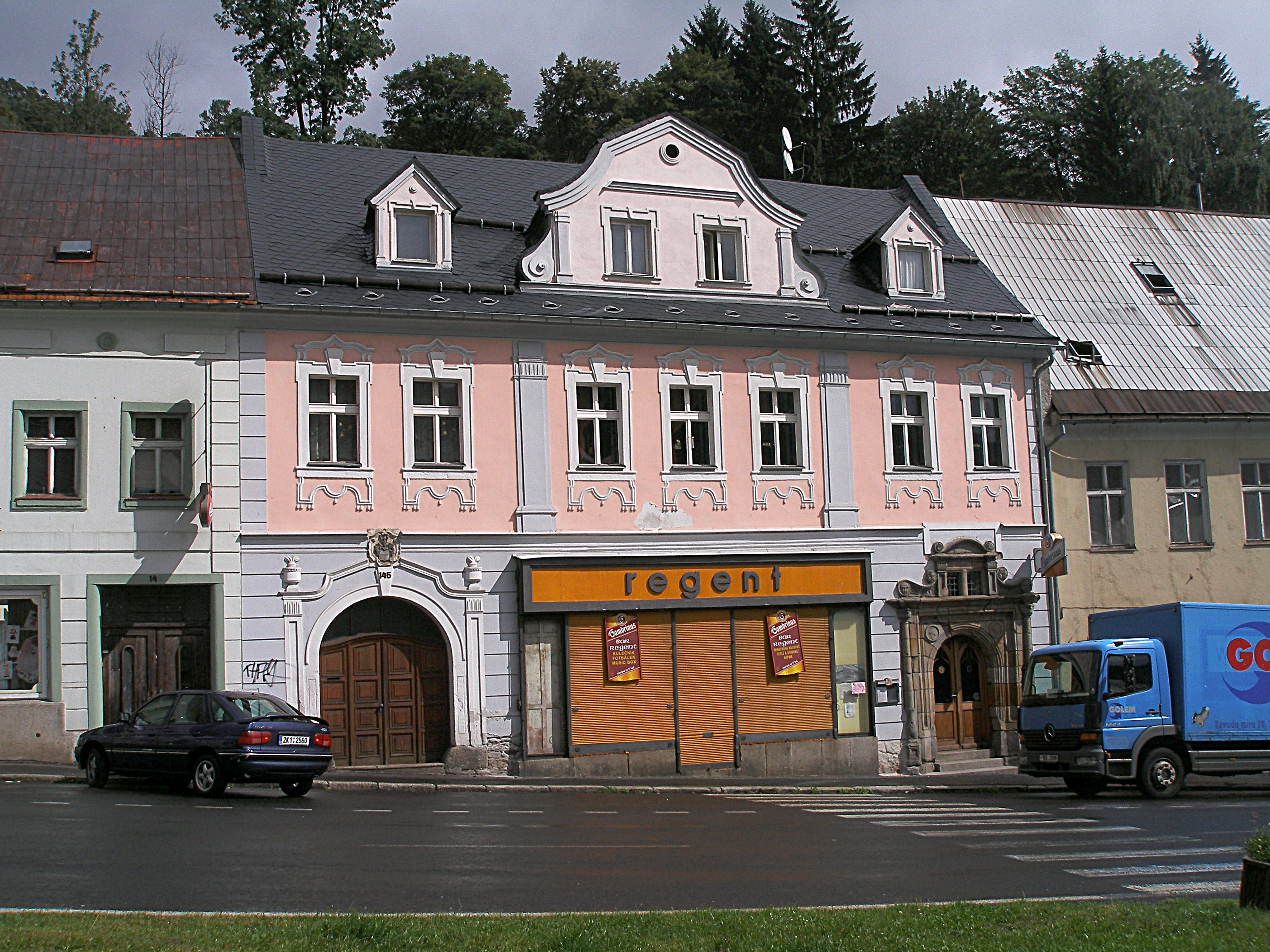 Jáchymov - dům č. 145